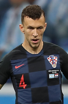 Это фиаско. Боль сборной Аргентины в фотографиях